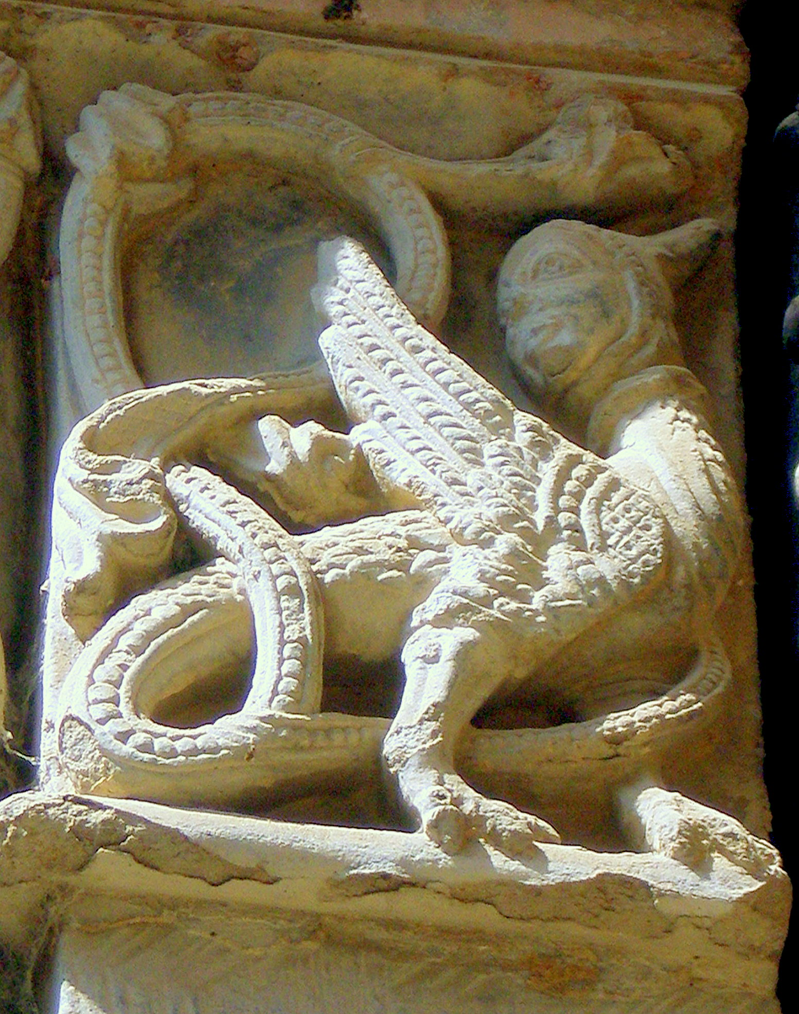 Detall del lateral de la portalada de l'església de Santa Maria d'Agramunt